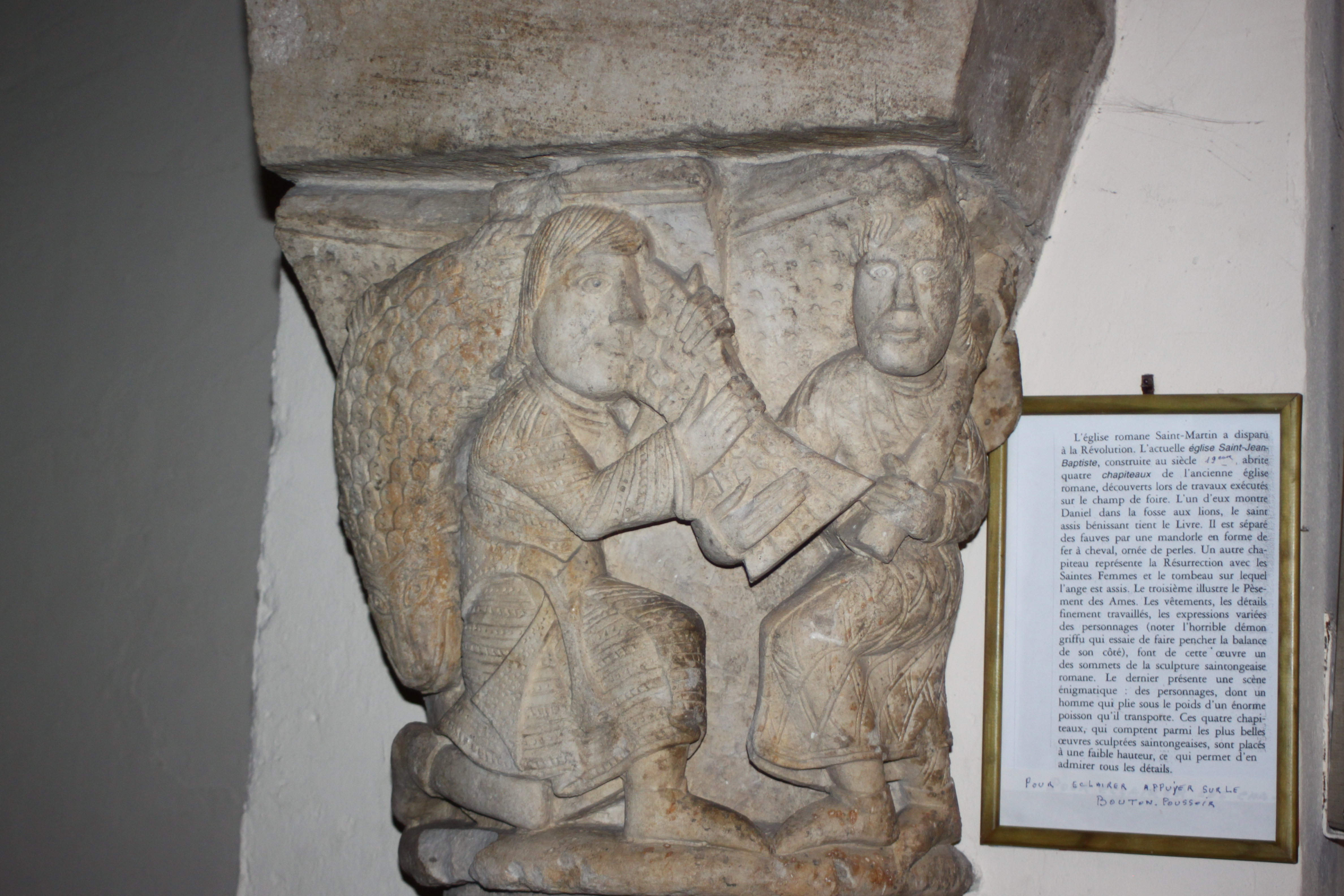 Église Saint-Jean-Baptiste, chapiteau de l'ancienne église Saint-Martin, Fr-17-Saujon.